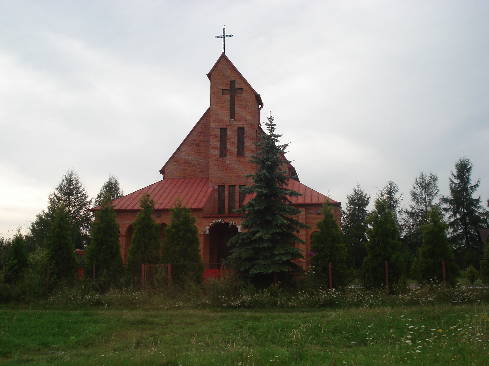 Kościół śś. Piotra i Pawła w Skarżysku-Kamiennej